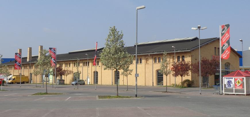 Baudenkmal Berlin-Schöneberg RAW Schmiede